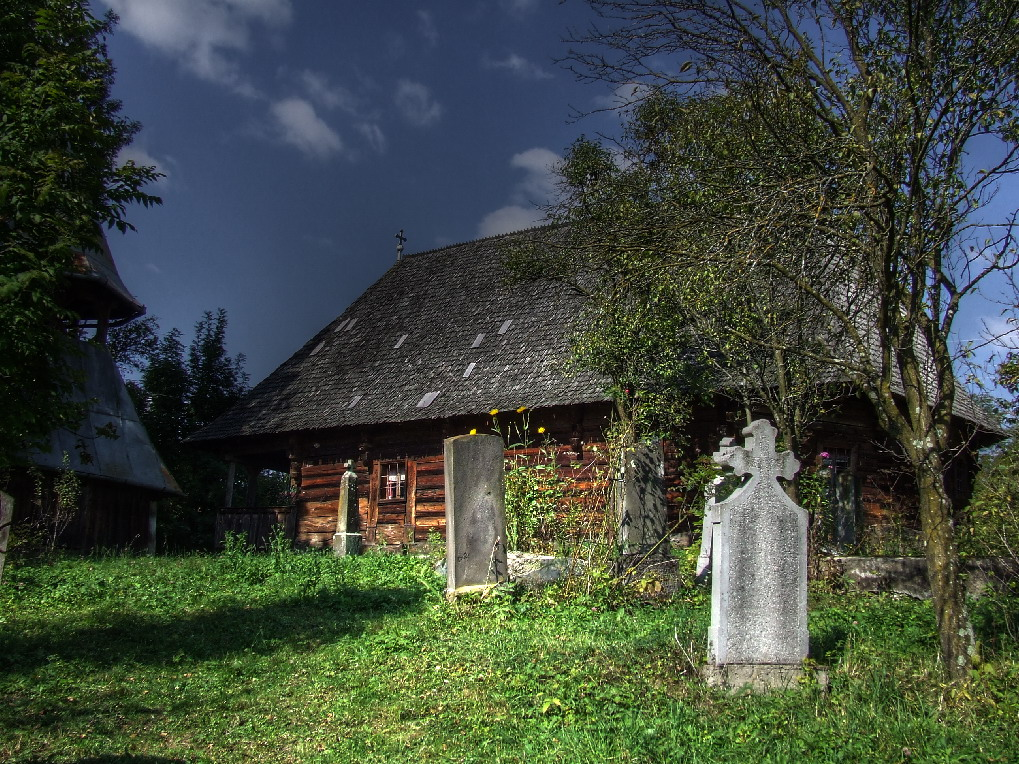 Biserica de lemn din Urişiu de Jos, judeţul Mureş. Vedere de ansamblu din sud-est.